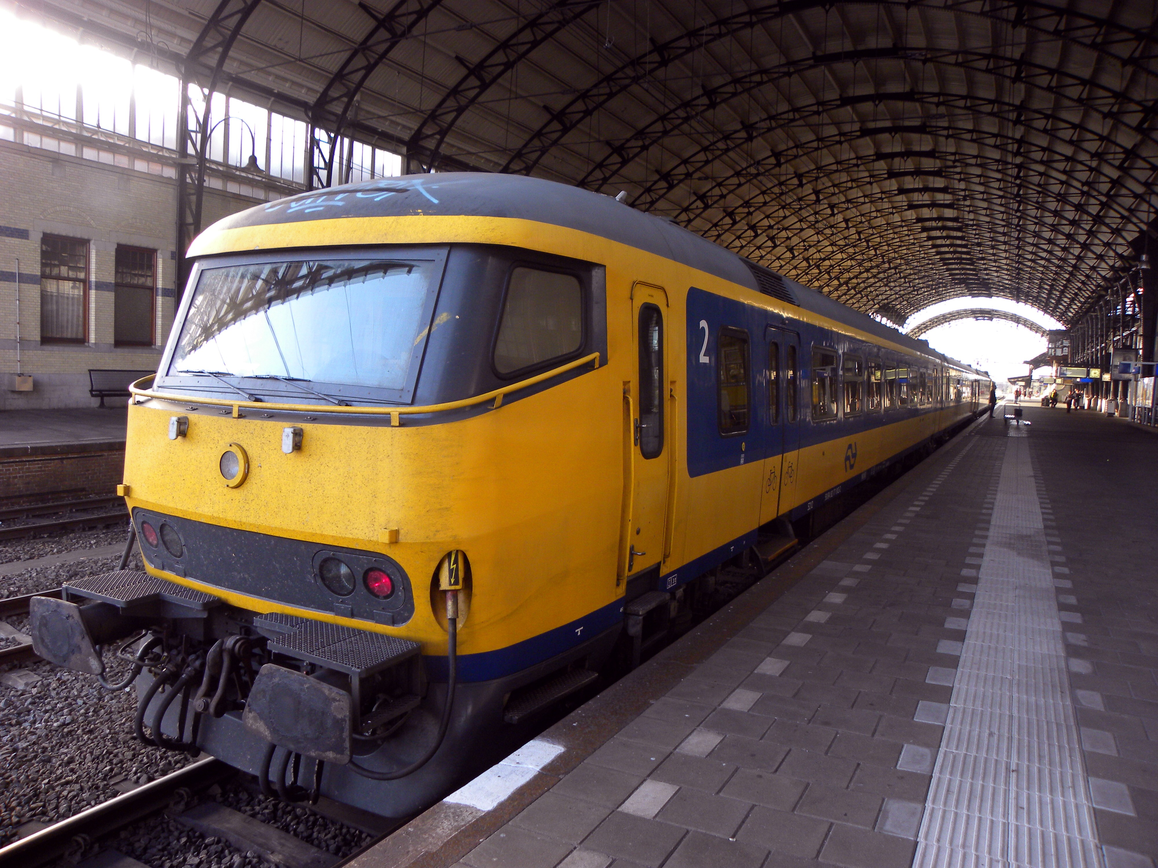 ICR ,Inter City Rijtuig ,Haarlem Station gezien van de kant van het stuurstandrijtuig er achter zit E loc 1776